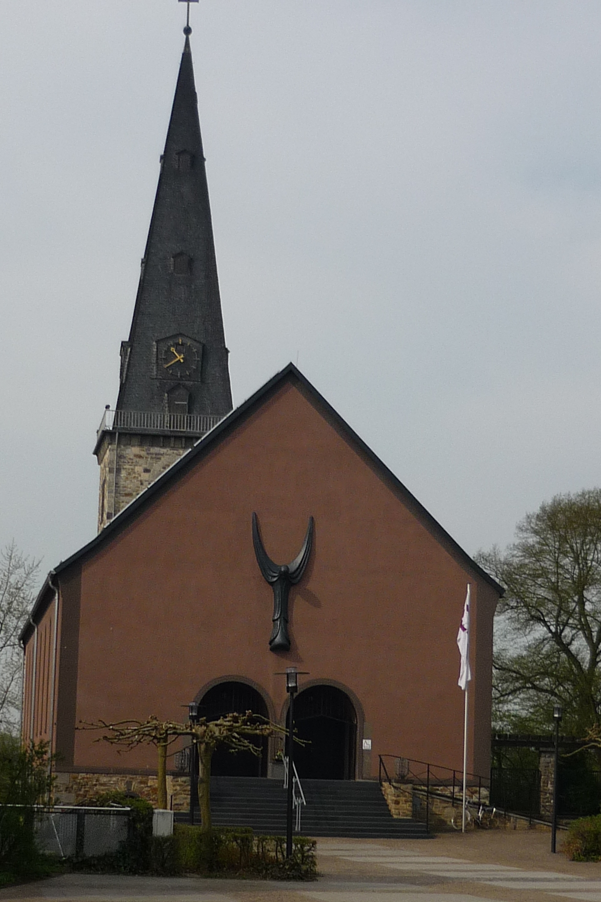 Altenkirchen (Westerwald)